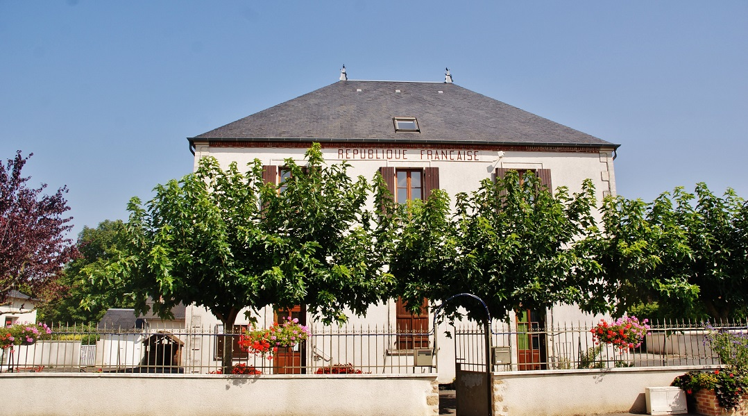 La Mairie